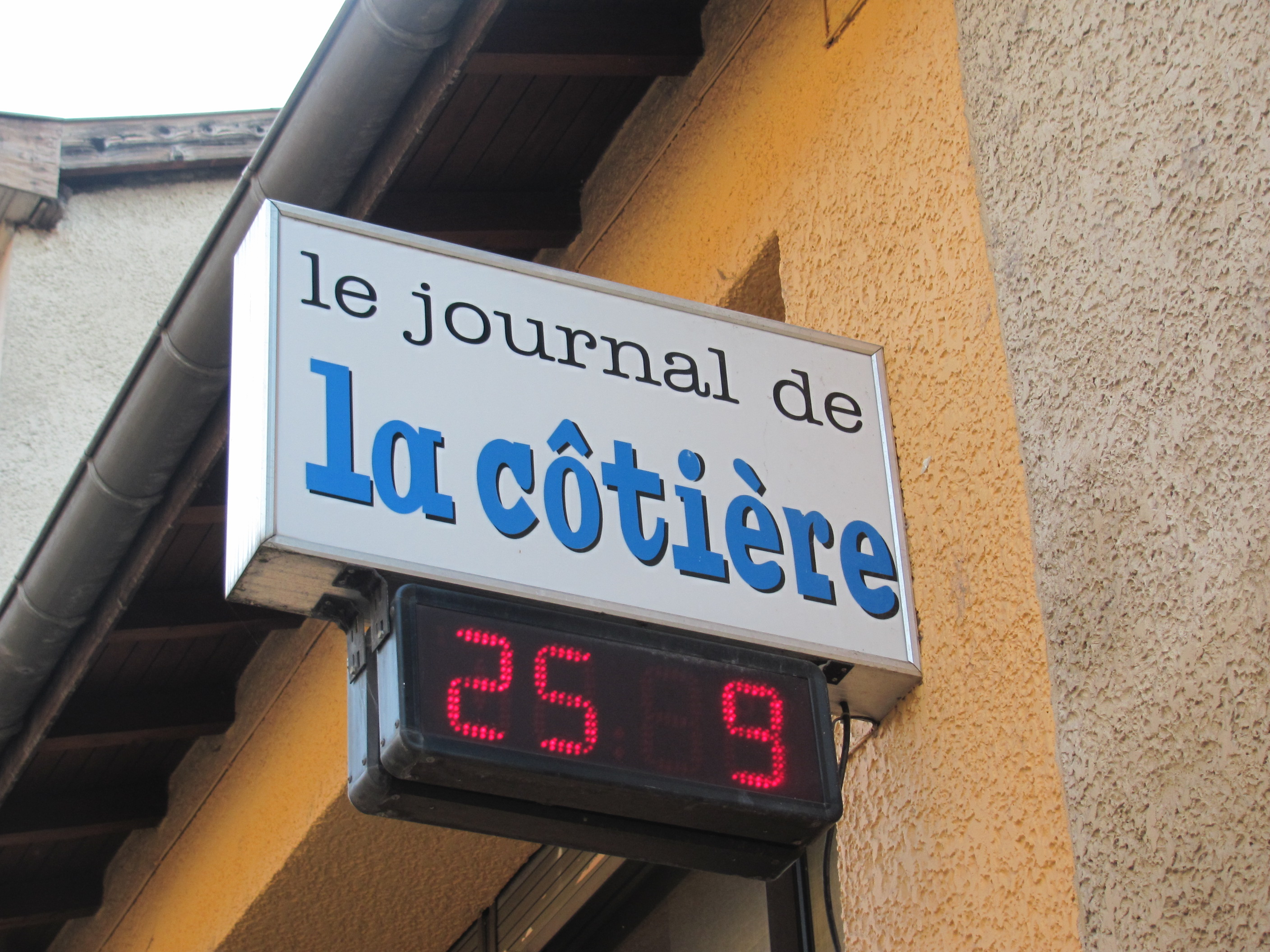 Logo du Journal de La Côtière à Montluel.